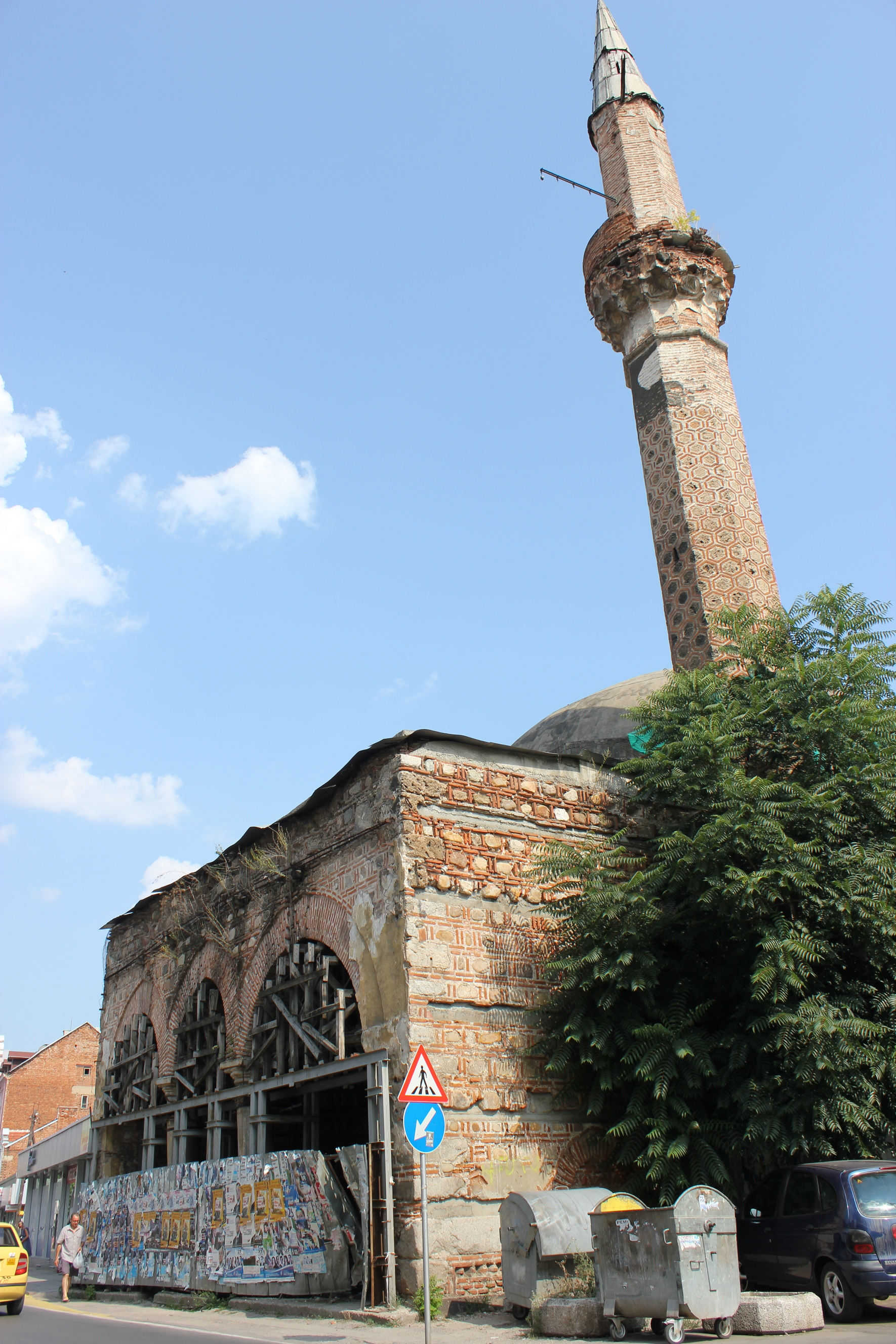 Hornjoserbsce: Mošeja Fatiha Mehmeta w bołharskim Kjustendilu.